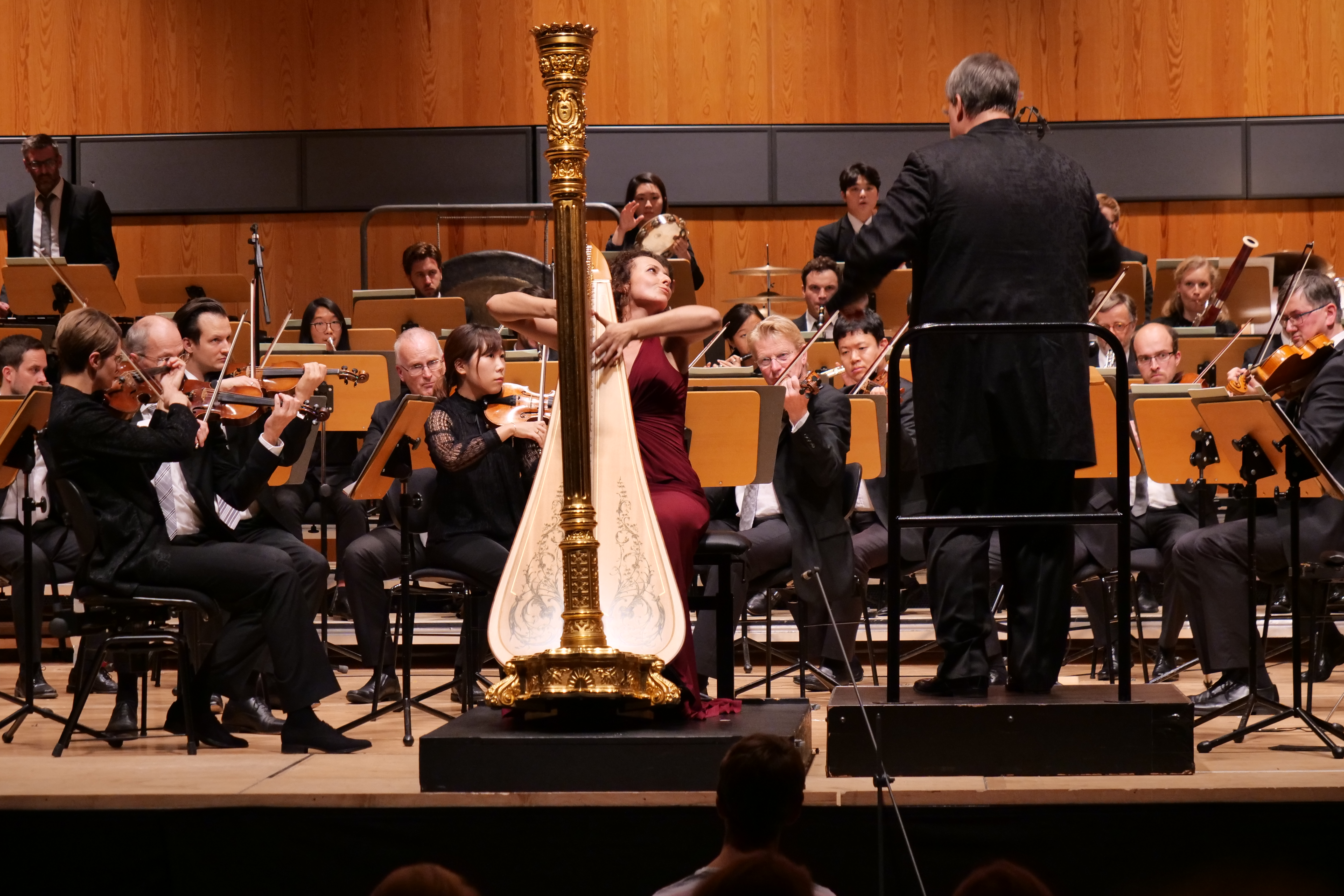 Hanna Rabe (Harfe) Nordwestdeutsche Philharmonie 17.10.2018 Konzerthaus der HfM Detmold. Leitung: Florian Ludwig